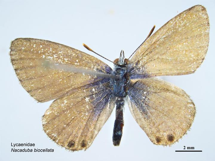 Nacaduba biocelleta, dorsal view.